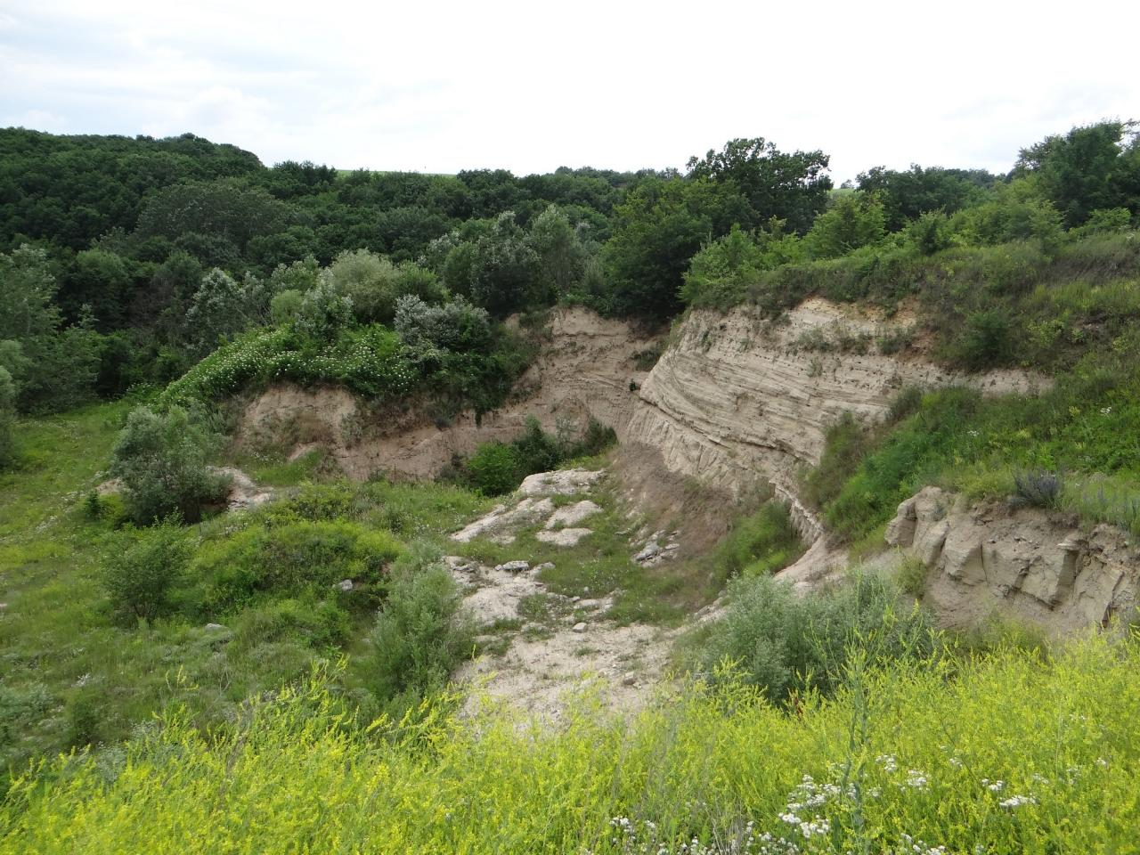 Карьер известняка-ракушечника возле поселка Черноморского